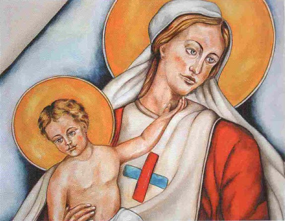 Nossa Senhora do Bom Remédio - patrona da Ordem Trinitária